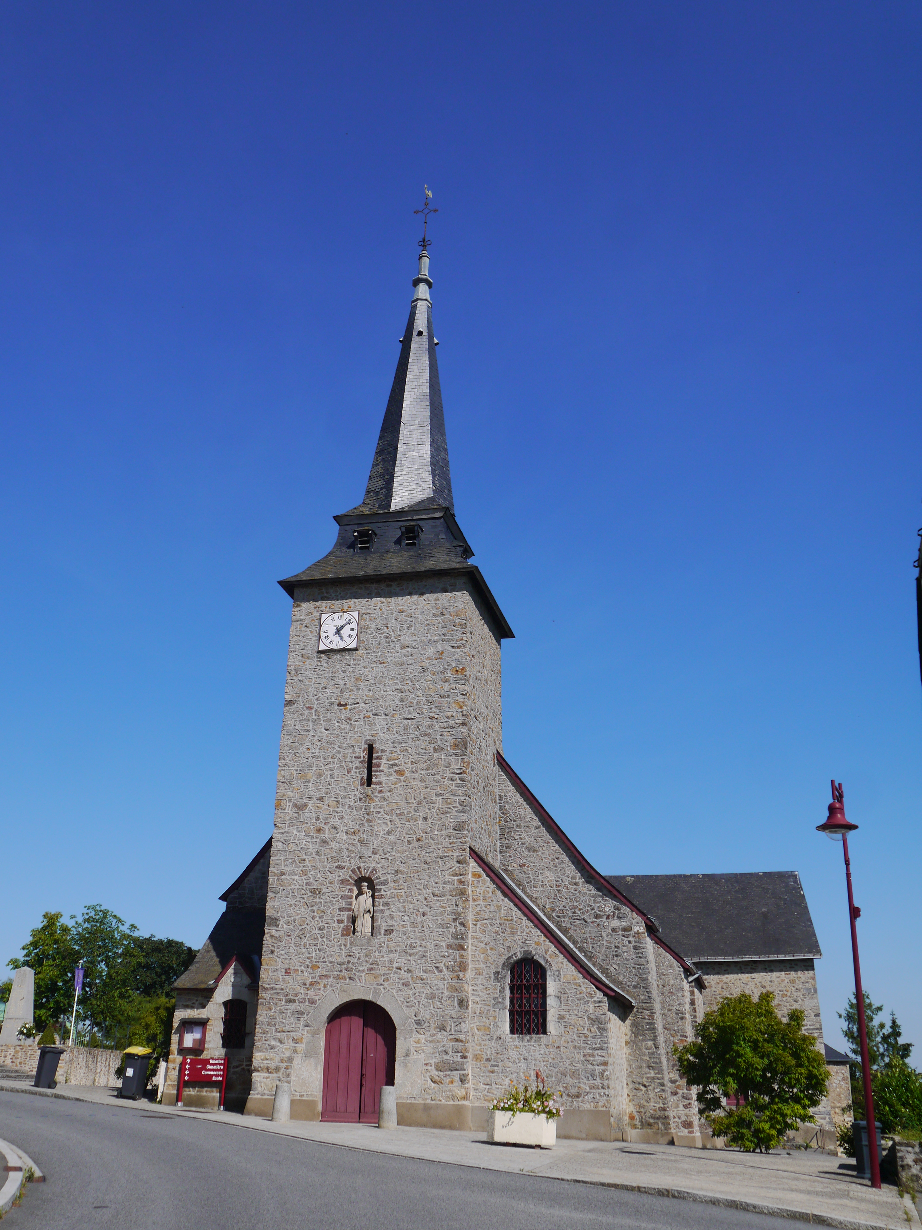 L'église Saint-Germain.